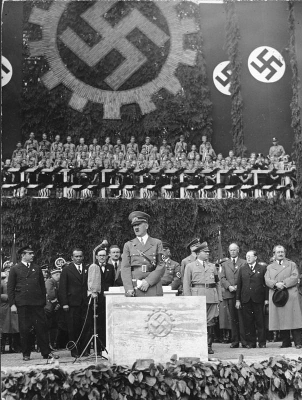 Grundsteinlegung der KdF-Wagen-Fabrik bei Fallersleben durch den "Führer". Der "Führer" vollzieht die drei Hammerschläge. 26.5.1938